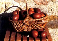 Les oeufs extra-roux de la Marans